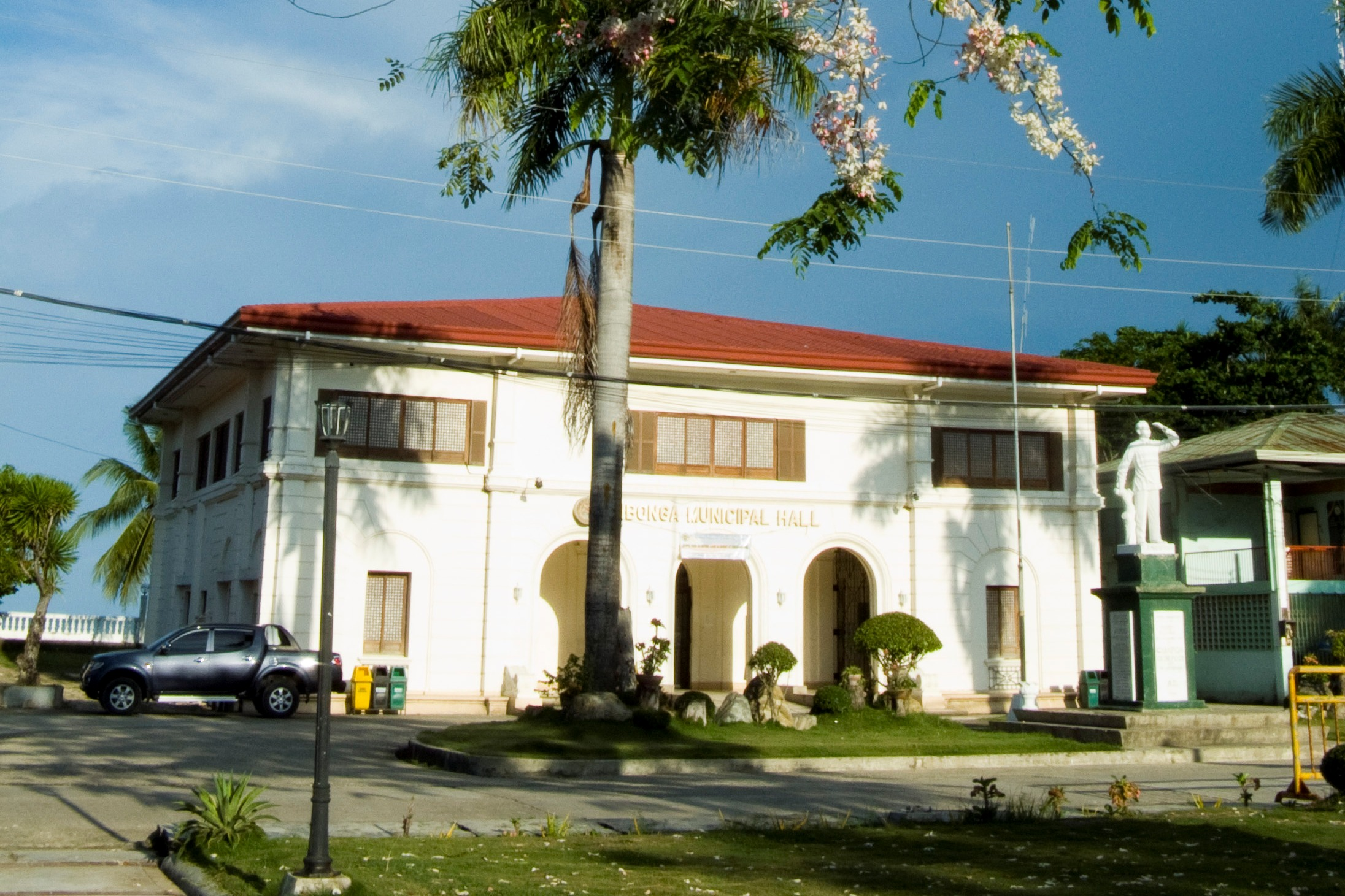 Sibonga, Cebu, Philippines